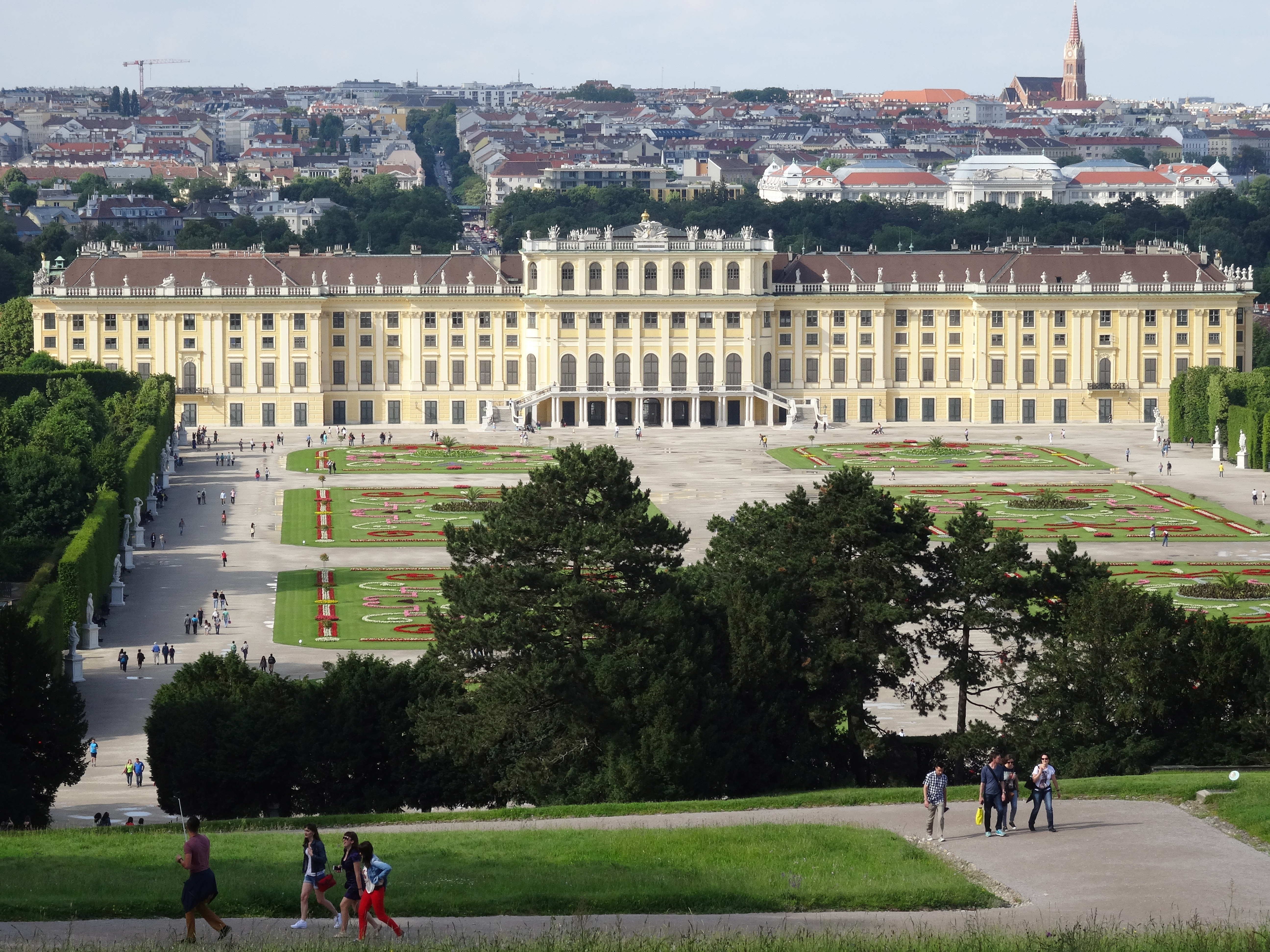 20160612 106 Wien Vienna Wenen - Schönbrunner Schlosspark